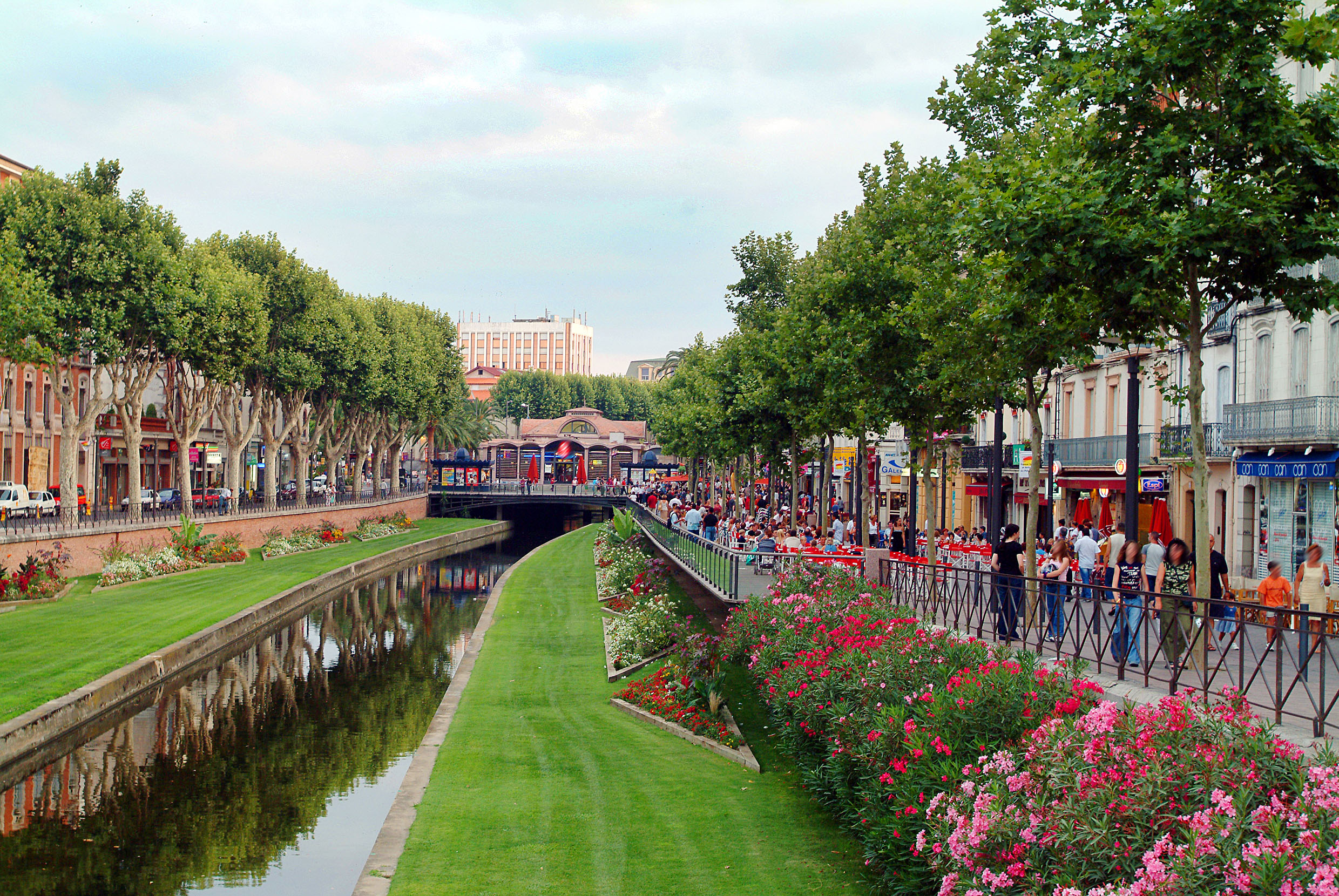 LES BERGES DE LA BASSE